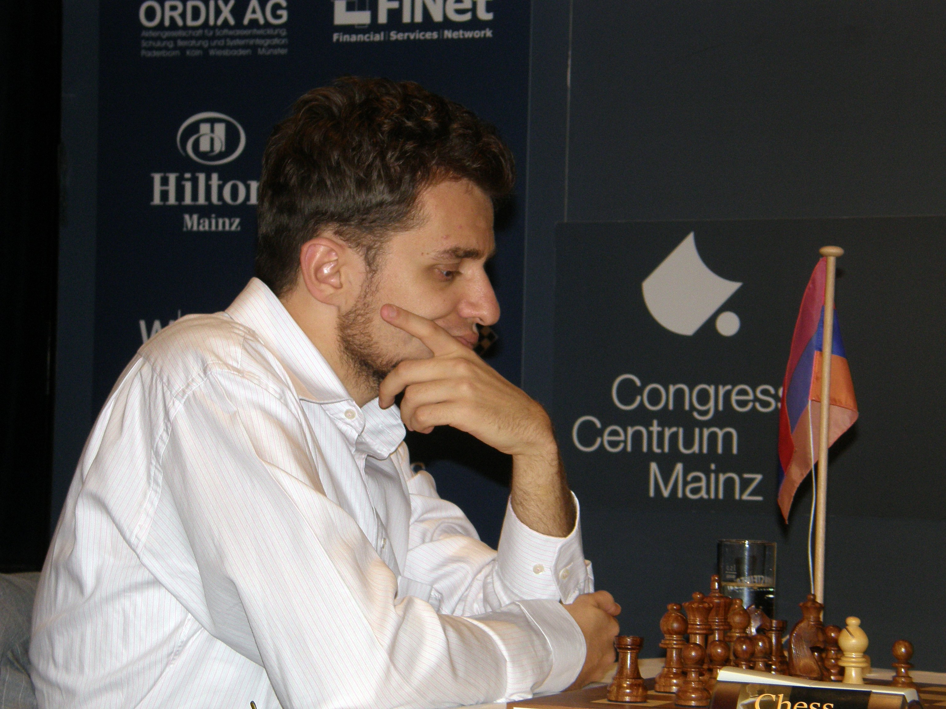 Гроссмейстер Левон Аронян